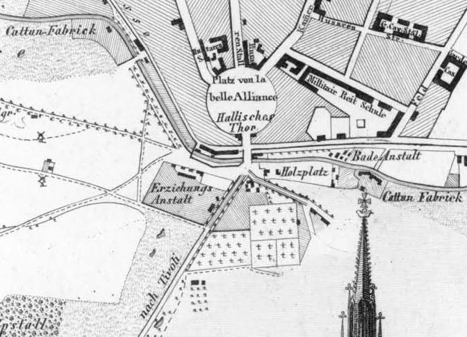 Berlin und Umgegend Karte Hildburghausen 1848: Ausschnitt mit der Erziehungsanstalt vor dem Halleschen Tor